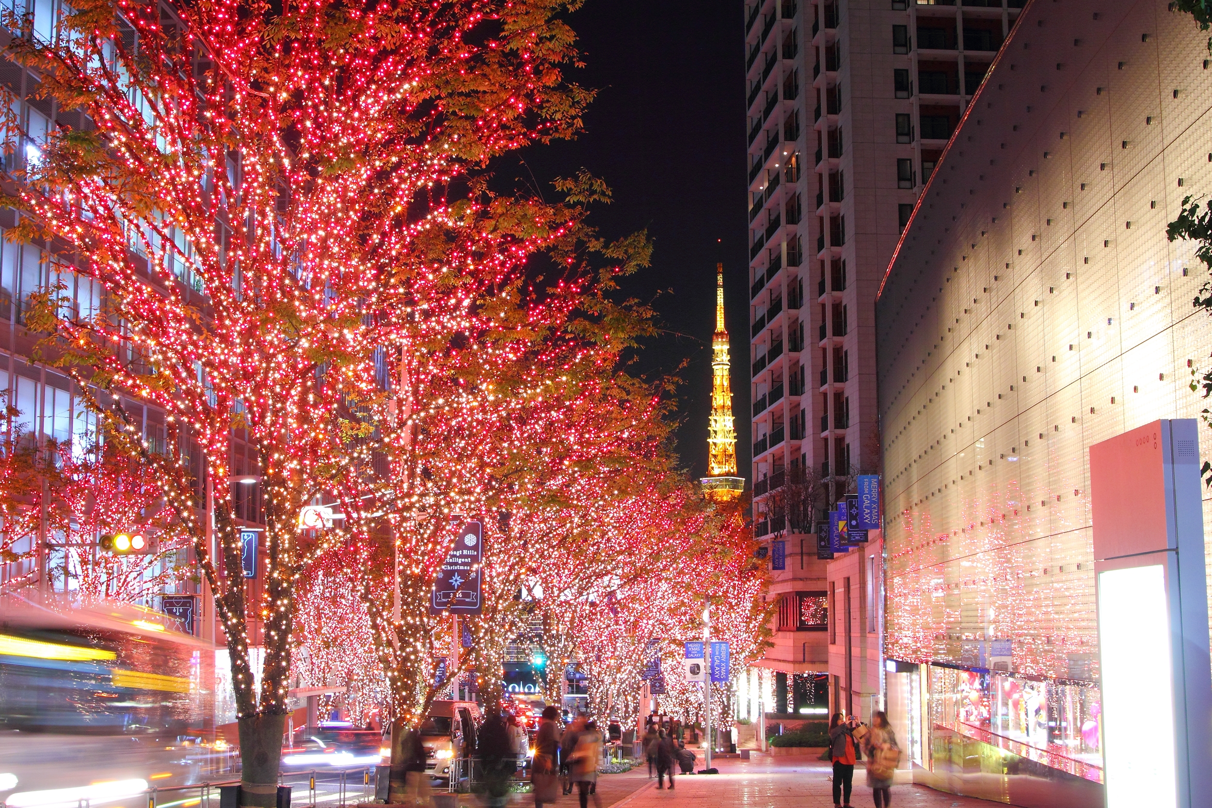 六本木ヒルズ、けやき坂のイルミネーション